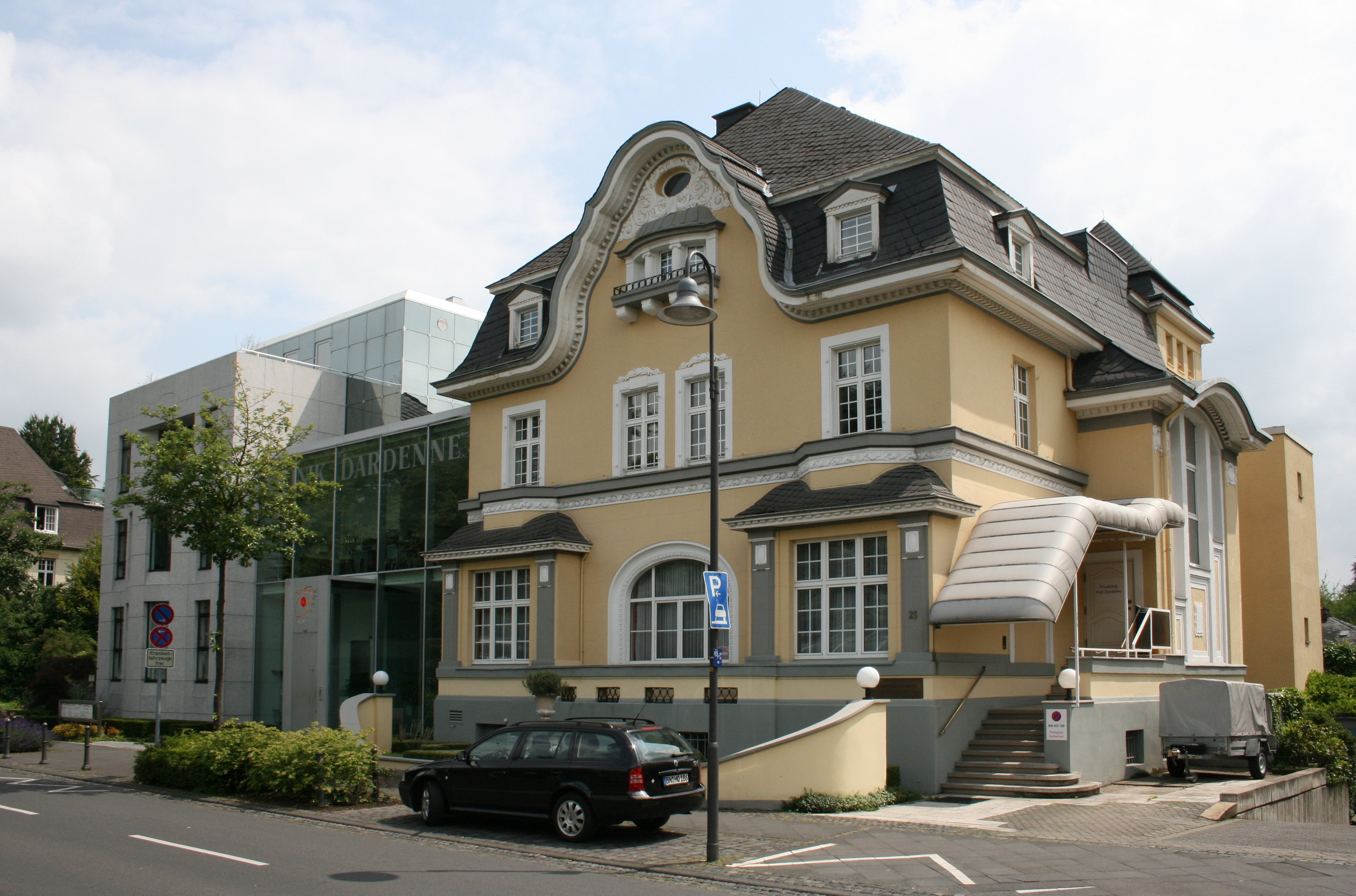 Deutschland, Bonn-Bad Godesberg, Friedrich-Ebert-Straße 23-25: private Augenklinik Dardenne.